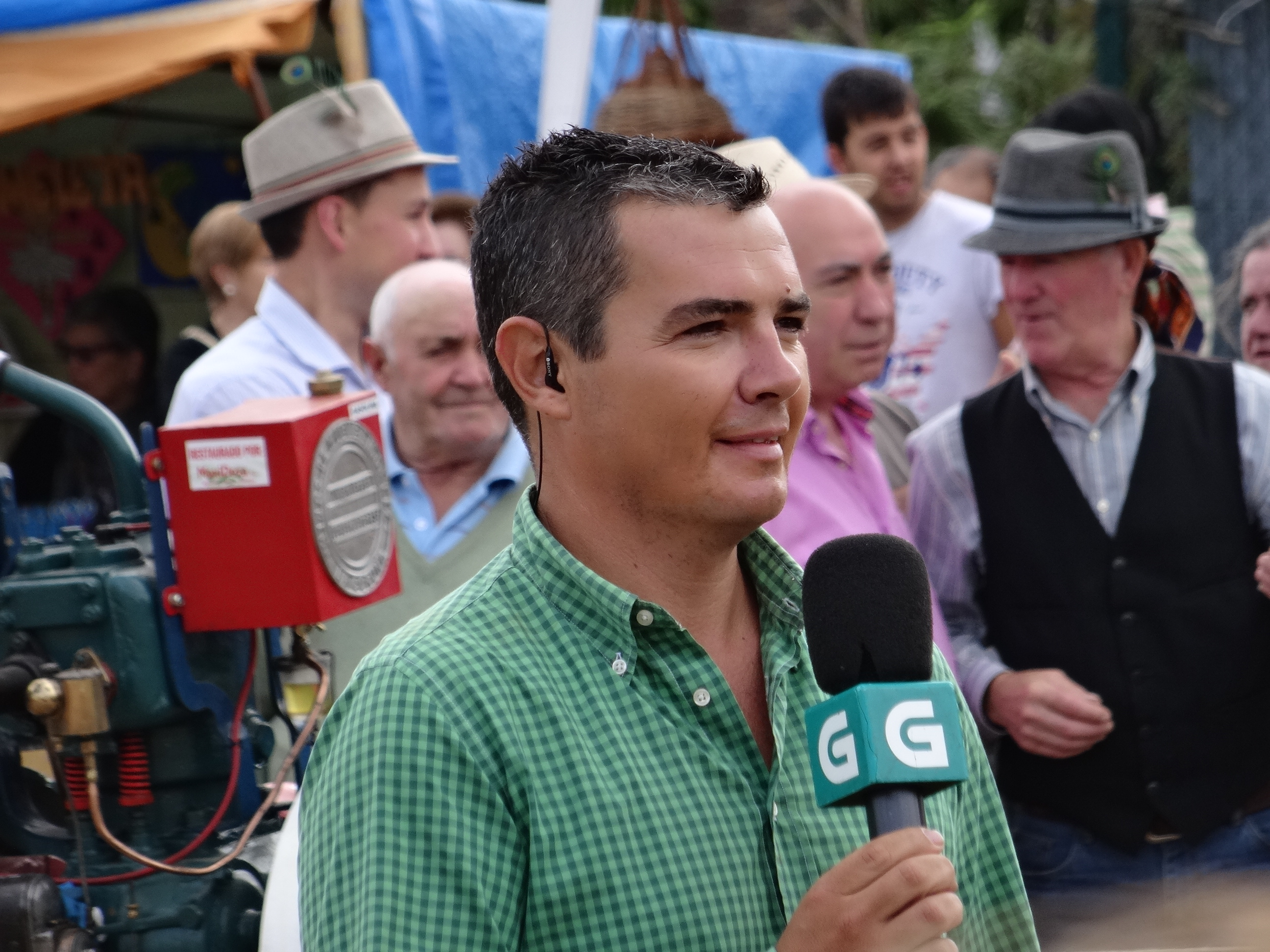 Presentador da TVG na Festa da Malla de Doade do 2015.